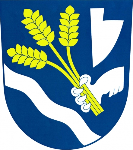 znak, Žichlínek, okres Ústí nad Orlicí